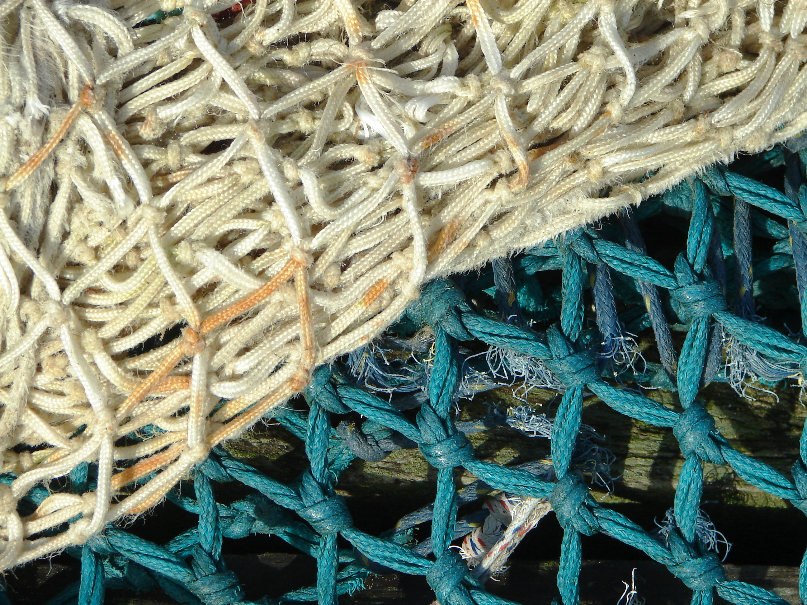 Lieu : Courseulles sur Mer (Normandie/France) - port Cordages et filets de pêche